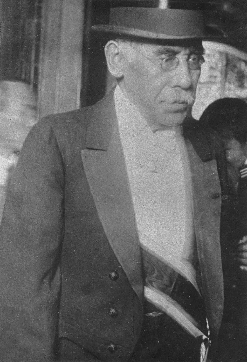 Portrait of Kato Takaaki (加藤高明, 1860 – 1926)